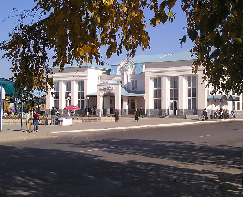 Автовокзал в г. Октябрьский